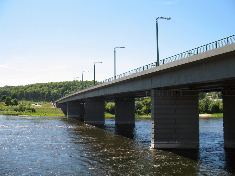 Čiurlionio tiltas, Kaunas.